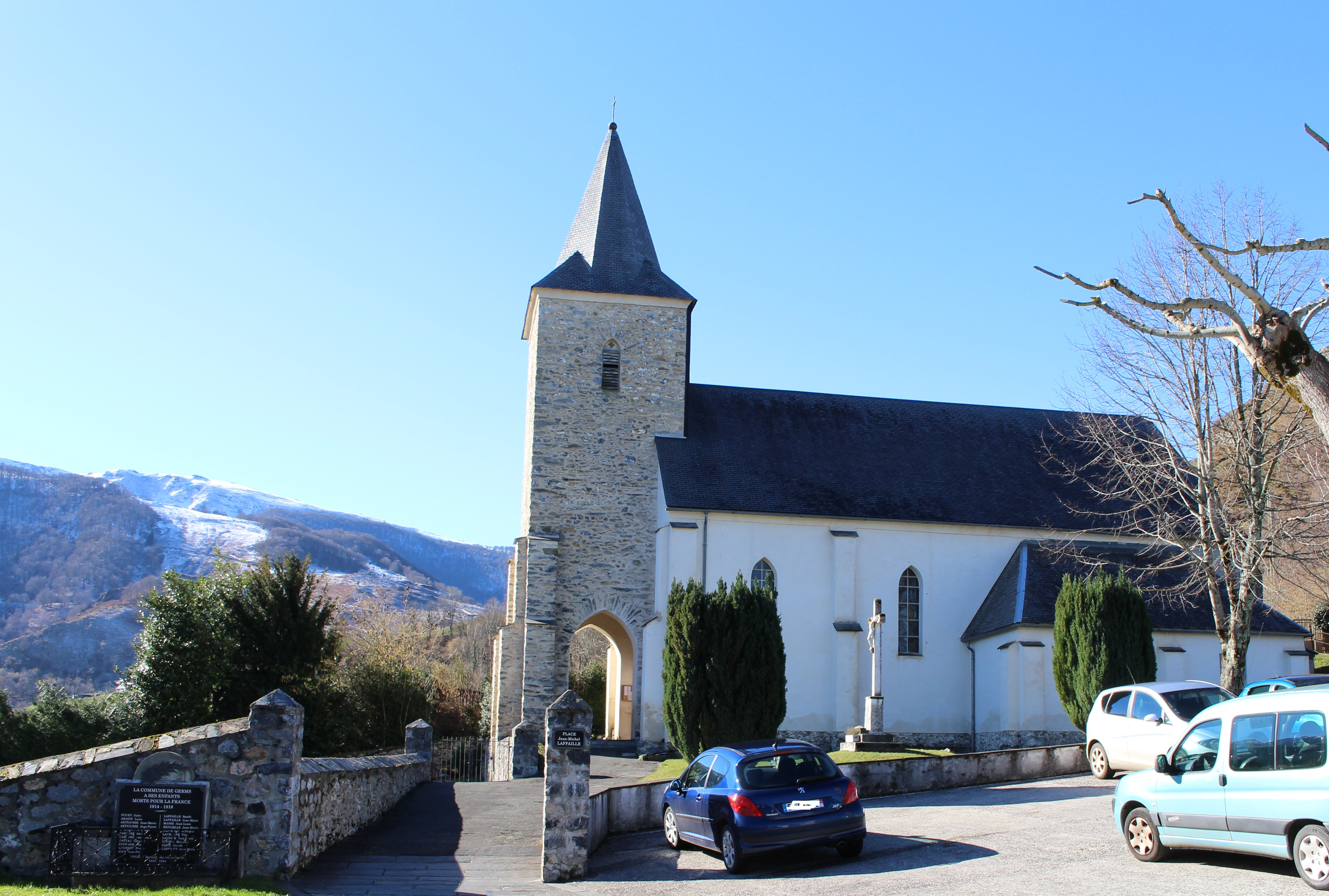 Église Saint-Jacques de Germs-sur-l'Oussouet (Hautes-Pyrénées)